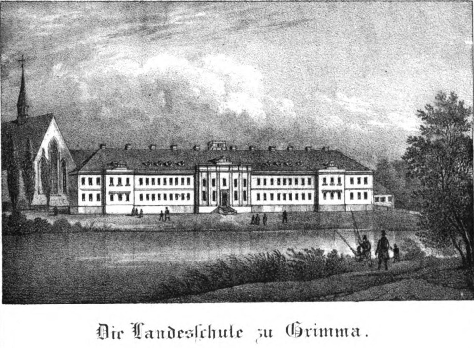 Saxonia Museum für saechsische Vaterlandskunde. Band 1. Dresden: Pietzsch und Comp. Siehe File:Saxonia Museum für saechsische Vaterlandskunde I.djvu